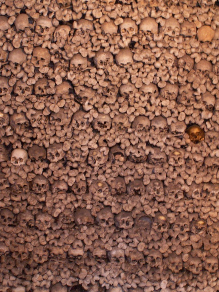 Blick ins Oppenheimer Gebeinhaus (Original text: Blick in das Oppenheimer Gebeinhaus.)